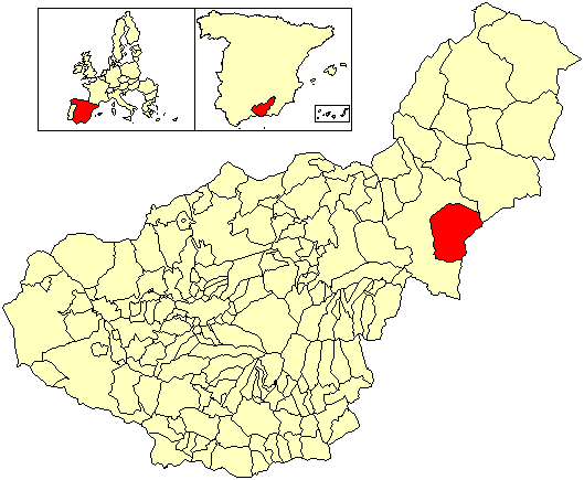 Situación del término municipal de Caniles respecto a la provincia de Granada, en España.